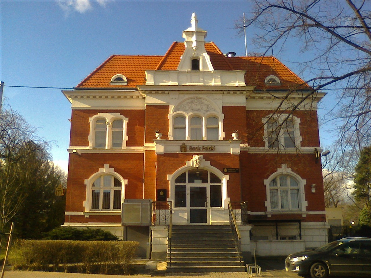 Dzierżoniów, ul. Świdnicka